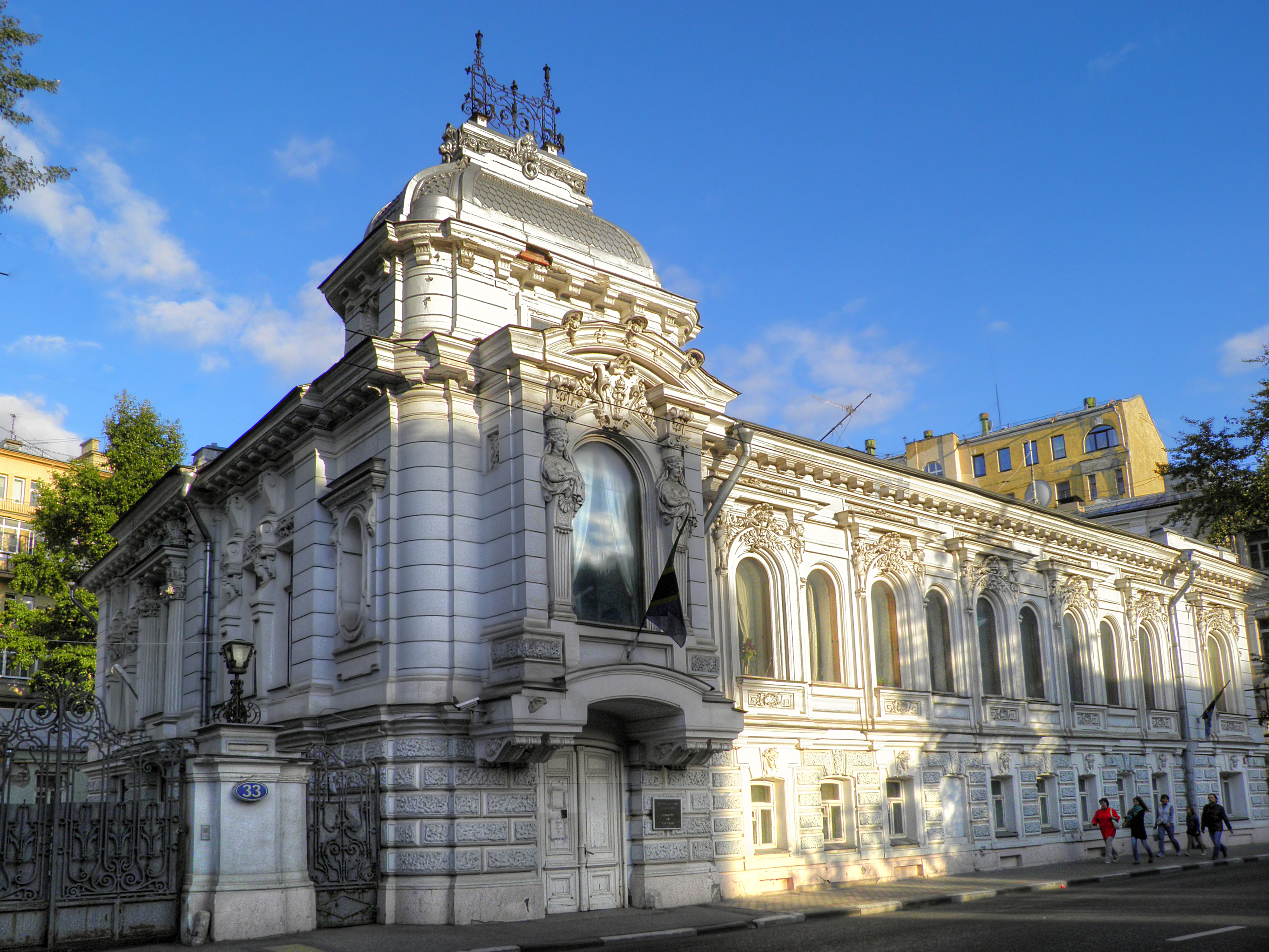 Особняк О.П. Коробковой со служебным флигелем и оградой: Пятницкая ул., дом 33-35, строение 3, Замоскворечье, Центральный округ, Москва